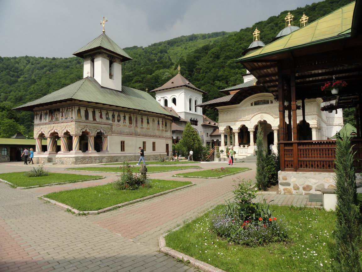 Biserica - Intrarea in Biserica-Lainici-vedere din curtea manastirii